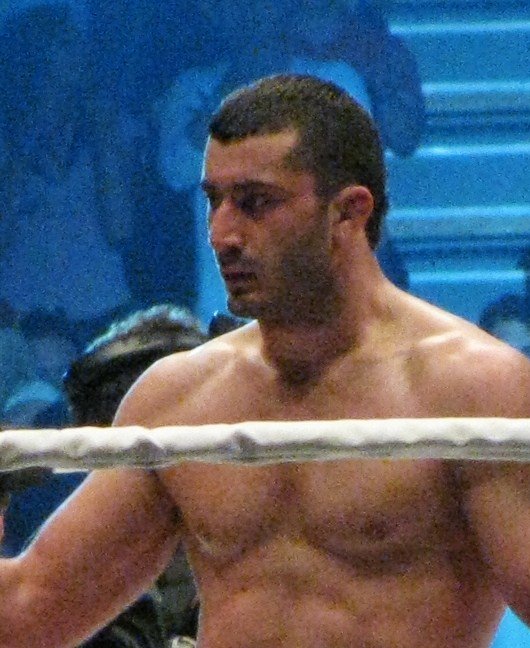 Mamed Khalidov podczas KSW XVI.